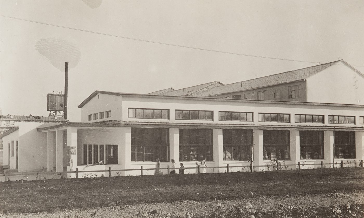 Das Bild zeigt das als Kantine geplante aber als Lebensmittelgeschäft genutzte Gebäude mit der Adresse Ulitsa Majakowskogo 40a. Rechts ist ein von Ernst May entworfener Häuserblock des Types INKO-A (Hausnummer 40) zu sehen.